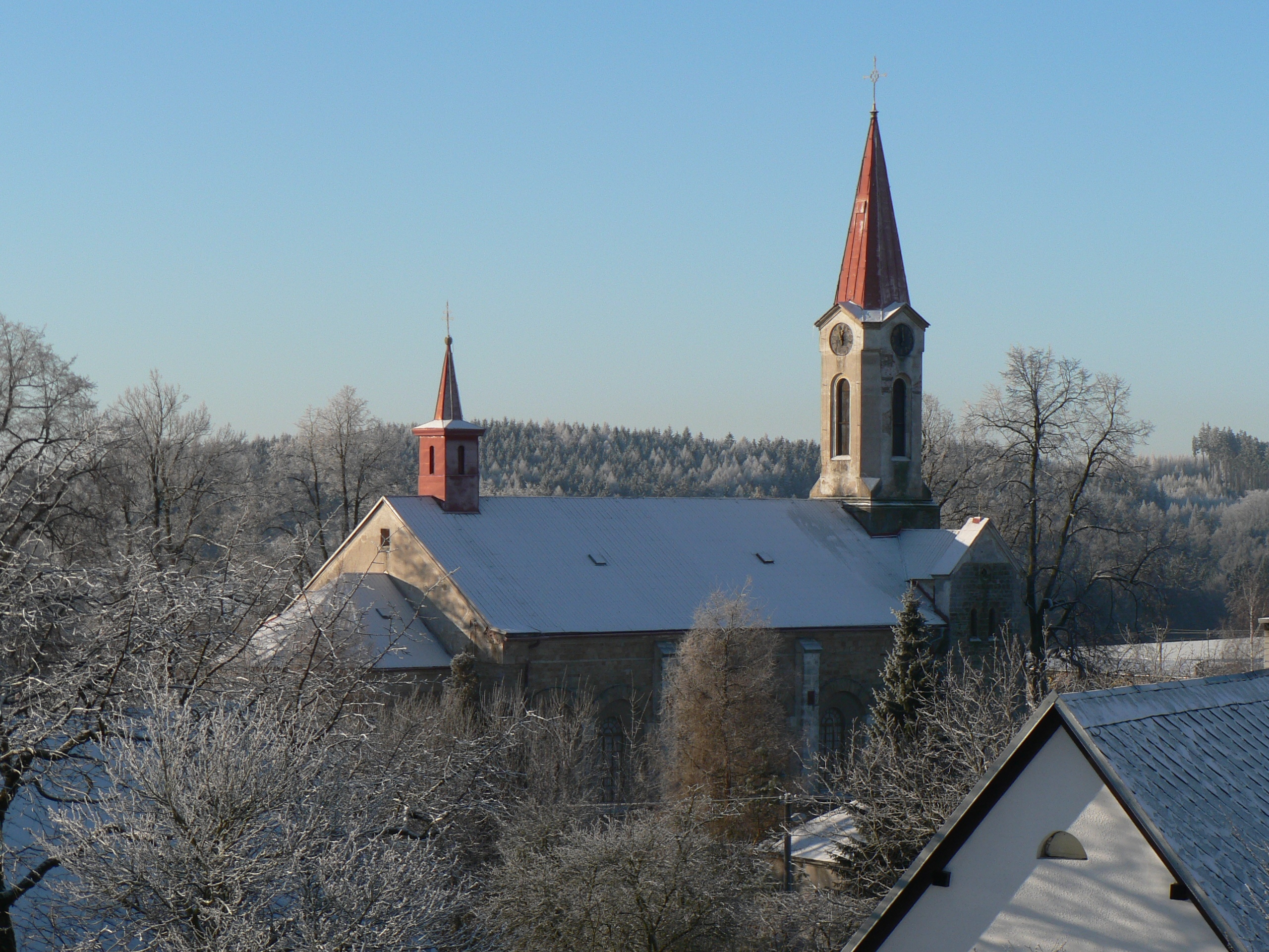 Kostel svaté Maří Magdaleny (Studená Loučka)